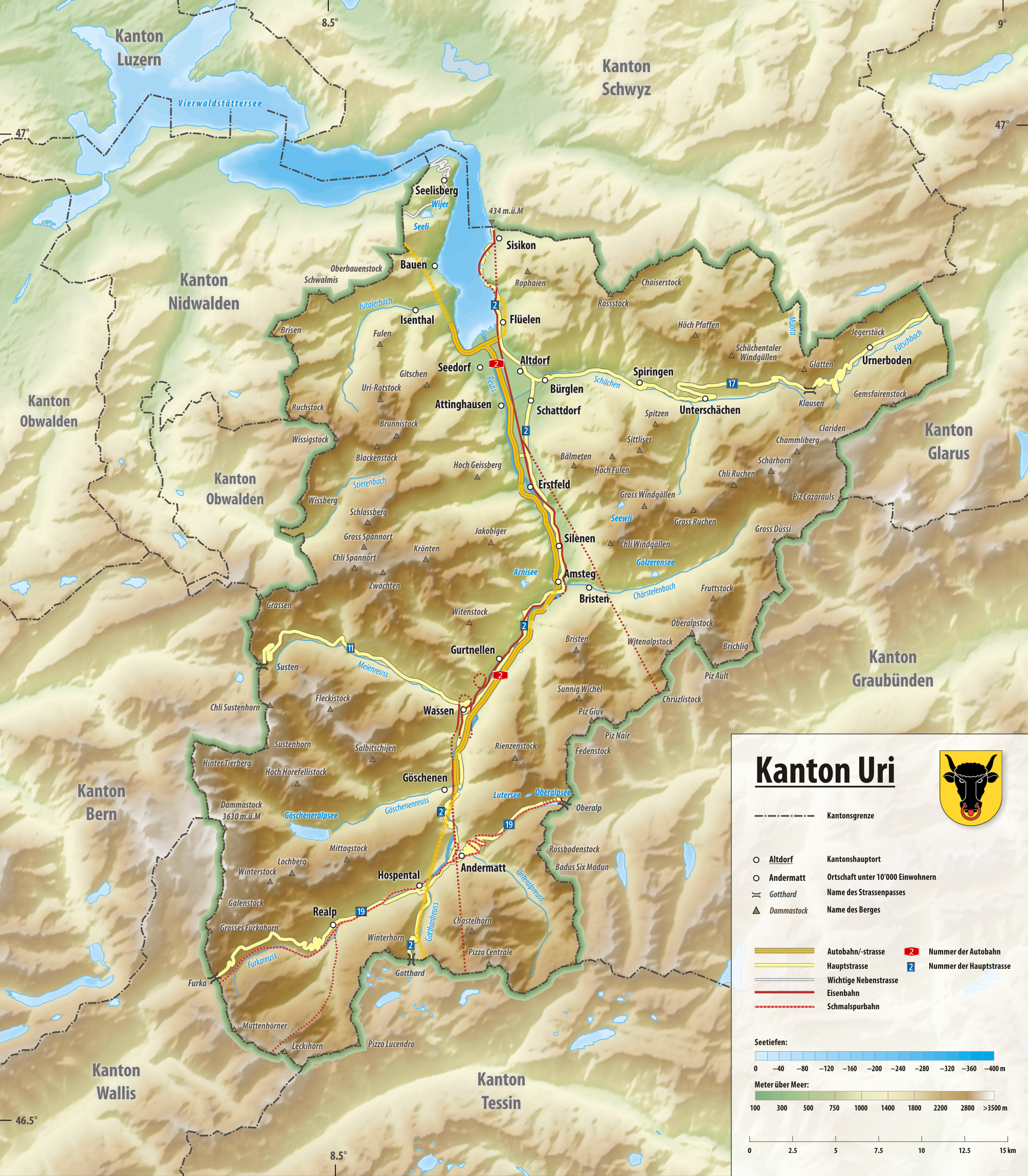 Reliefkarte des Kantons Uri Topographischer Hintergrund: NASA Shuttle Radar Topography Mission (public domain). SRTM3 v.2.